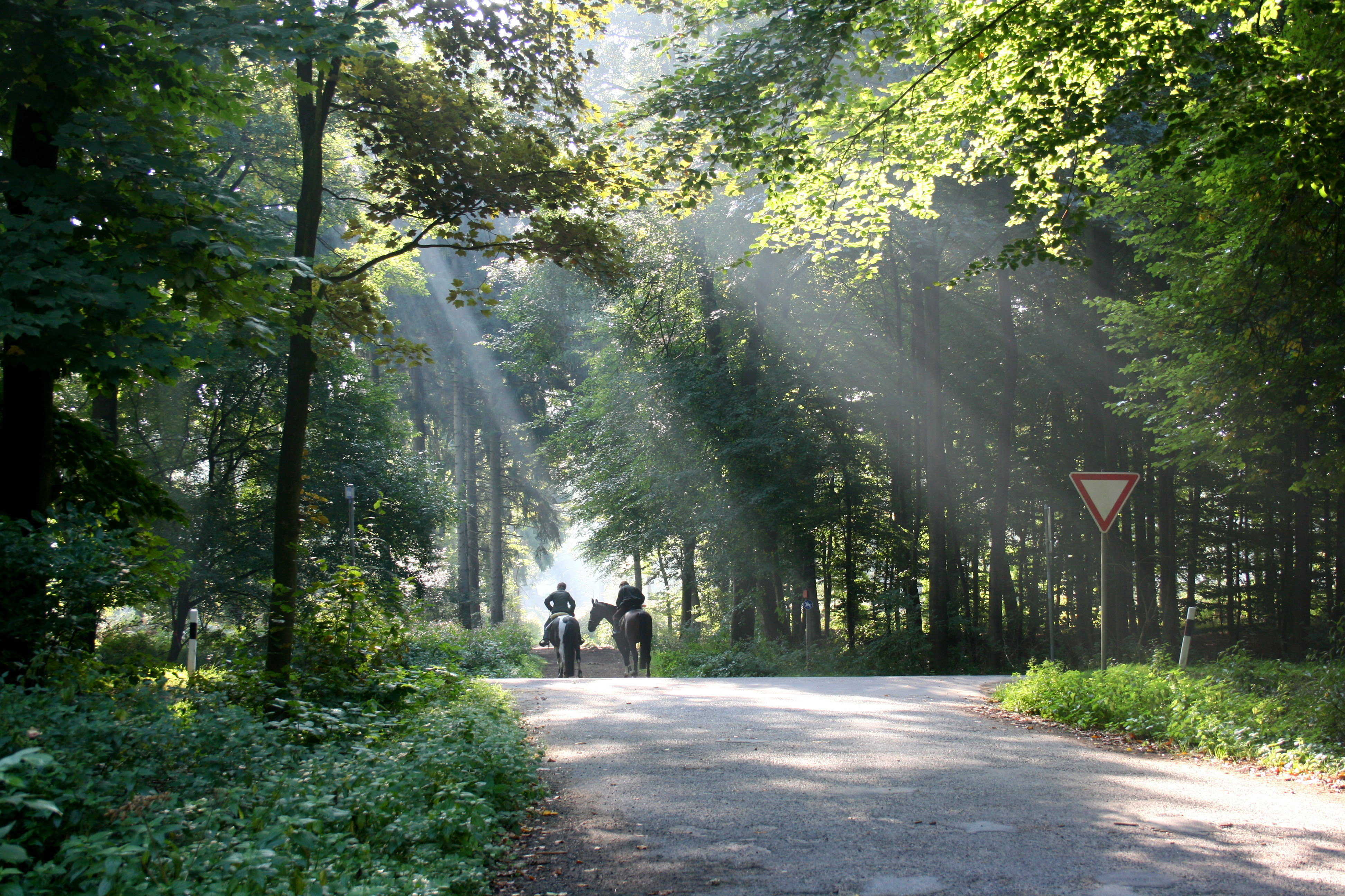 Nördlicher Teil des Uedemer Hochwalds im Uedem, Blick über die Marienbaumer Straße; abgebildeter Bereich im Landschaftsschutzgebiet „Balberger Höhenrücken mit den Waldgebieten Uedemer Hochwald und Tüschenwald“